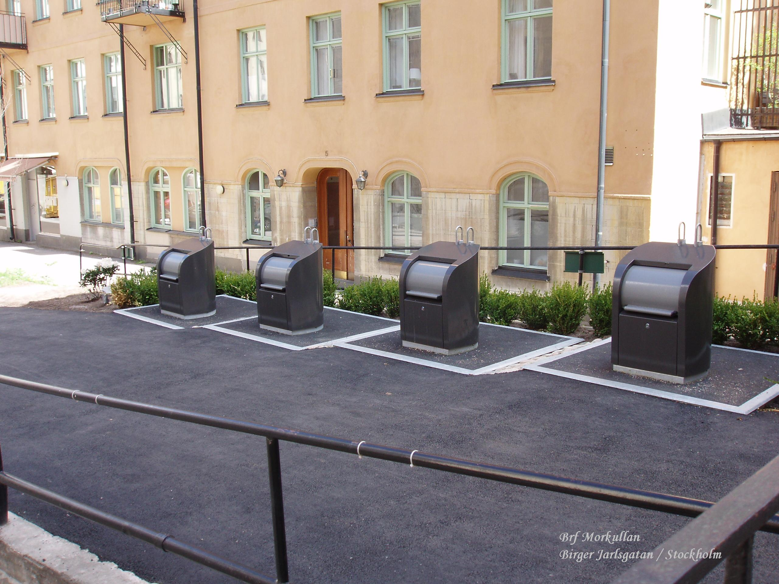 UWS installation i Stockholm